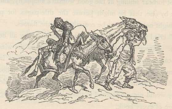 "Dom Quixote acompanhado pelo lavrador vizinho", iIustração por Gustave Doré para “Don Quixote“ de Miguel de Cervantes.